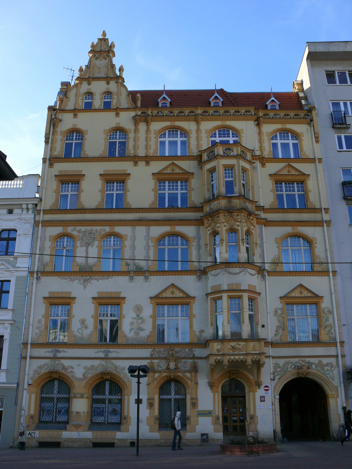 Kamienica Krusche i Ender, Piotrkowska 143 w Łodzi